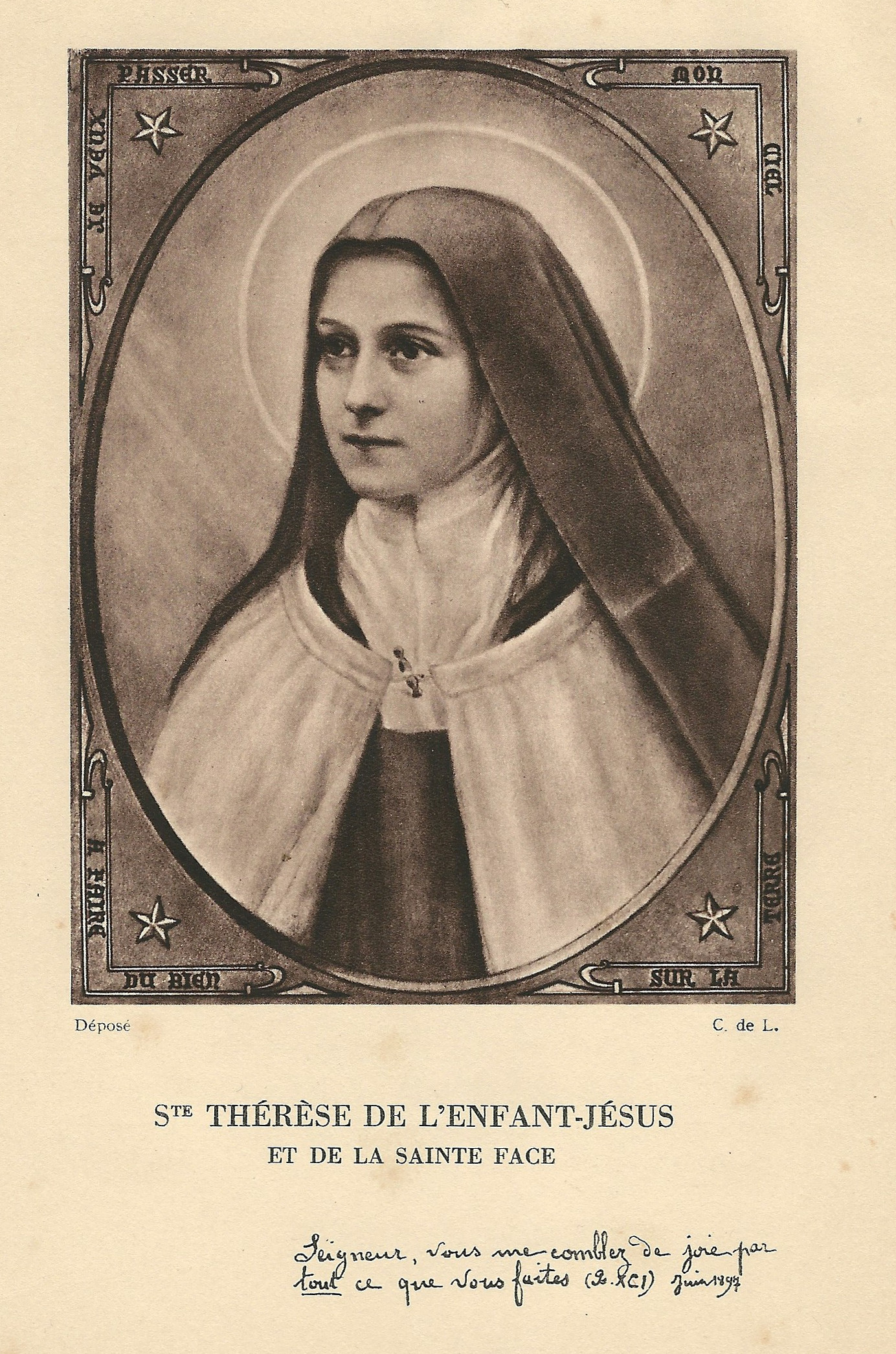 Gravure de "Sainte Thérèse de l'Enfant Jésus, Histoire d'une âme écrite par elle-même, Lisieux, Office central de Lisieux (Calvados), & Bar-le-Duc, Imprimerie Saint-Paul, 1937, édition 1940."